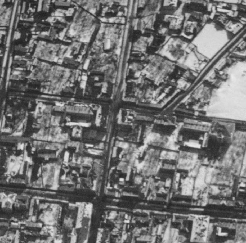 Беларуская (тарашкевіца): Менск (Miensk), мяжа Новага Места (Novaje Miesta) і Ляхаўкі (Lachaŭka), скрыжаваньні вуліцы Францішканскай з Падгорнай і Магазыннай. Аэрафотаздымак